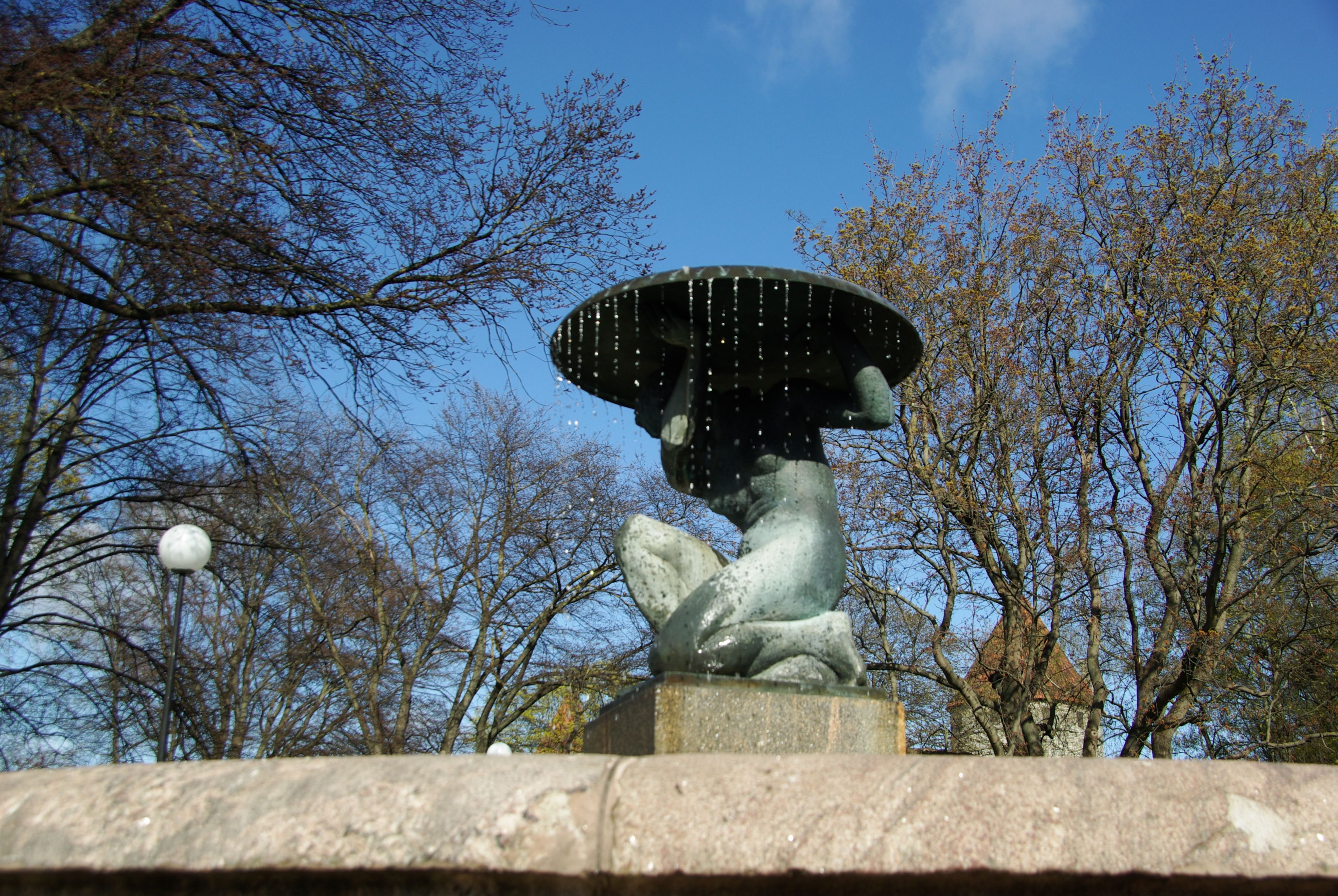 Tornide väljaku park